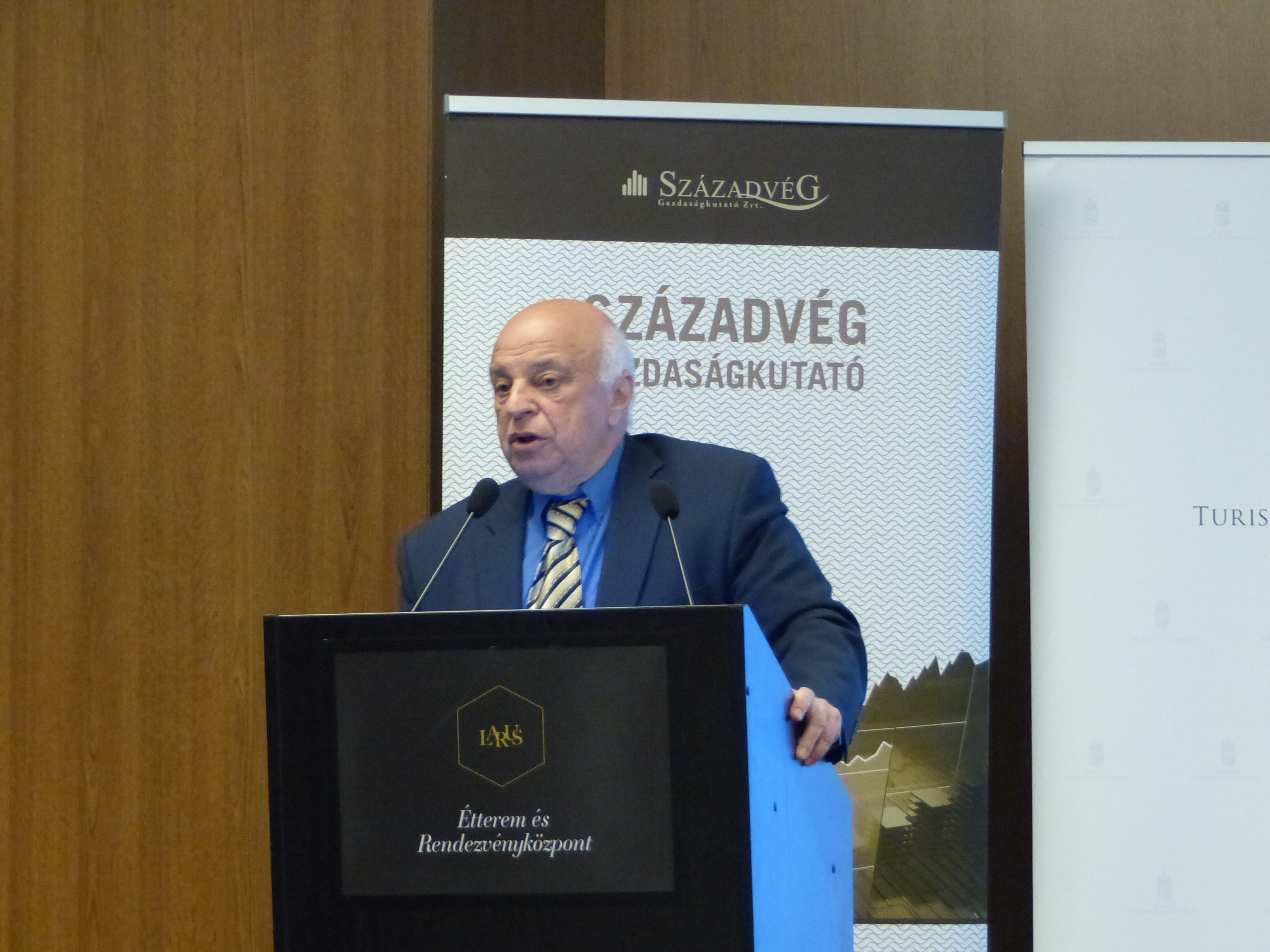 Nógrádi György biztonságpolitikai szakértő. A felvétel 2017. március 23-án, csütörtökön készült a Larus Rendezvényközpontban (1124 Budapest, Csörsz utca 18/B). Turizmus - a gazdaság egyik sikerágazata (konferencia). Nógrádi György előadás tartott a biztonságpolitika és a turizmus összefüggéseiről.